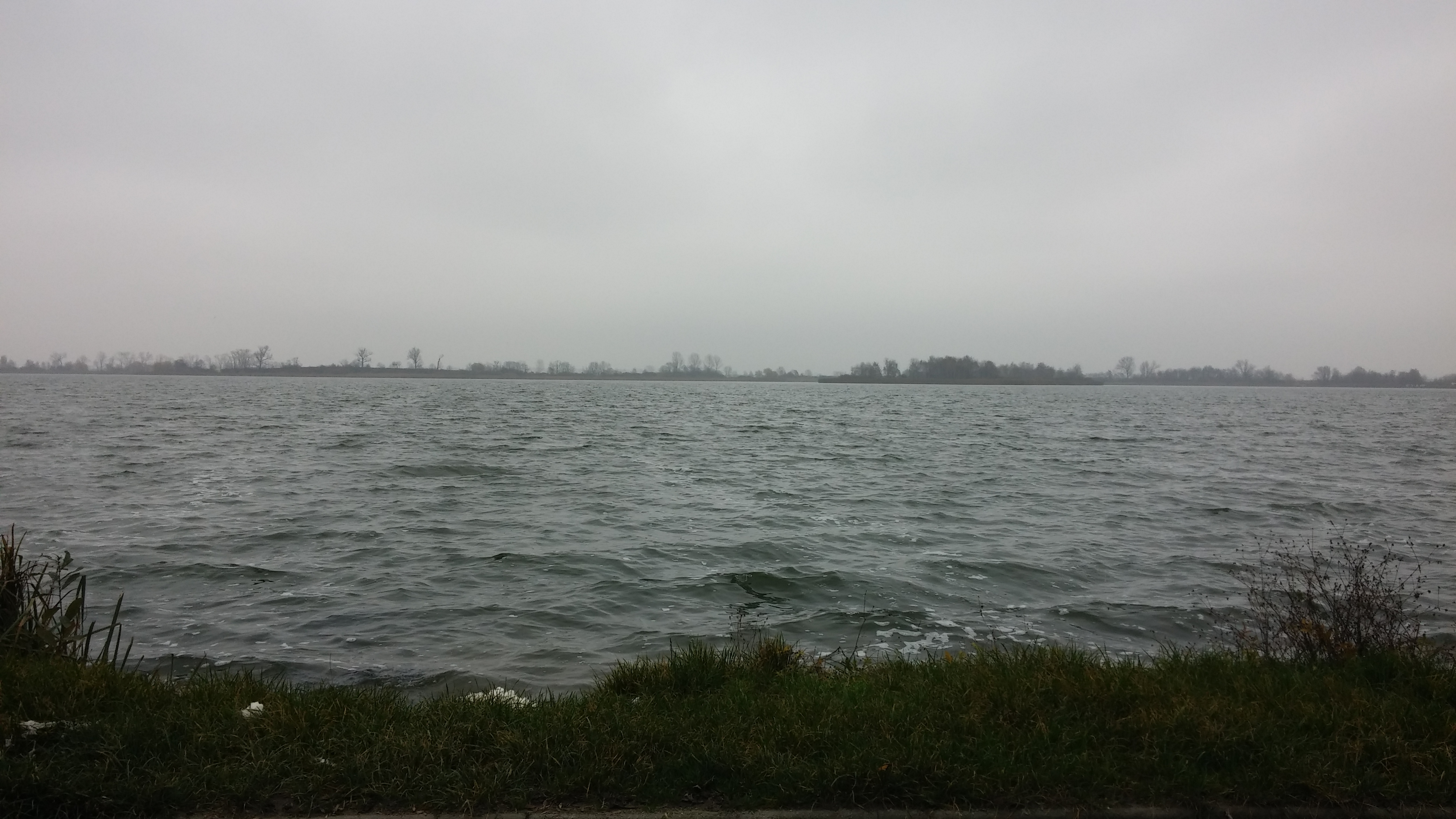 Jezioro w Kunicach, w oddali widać wyspę. Listopad 2014